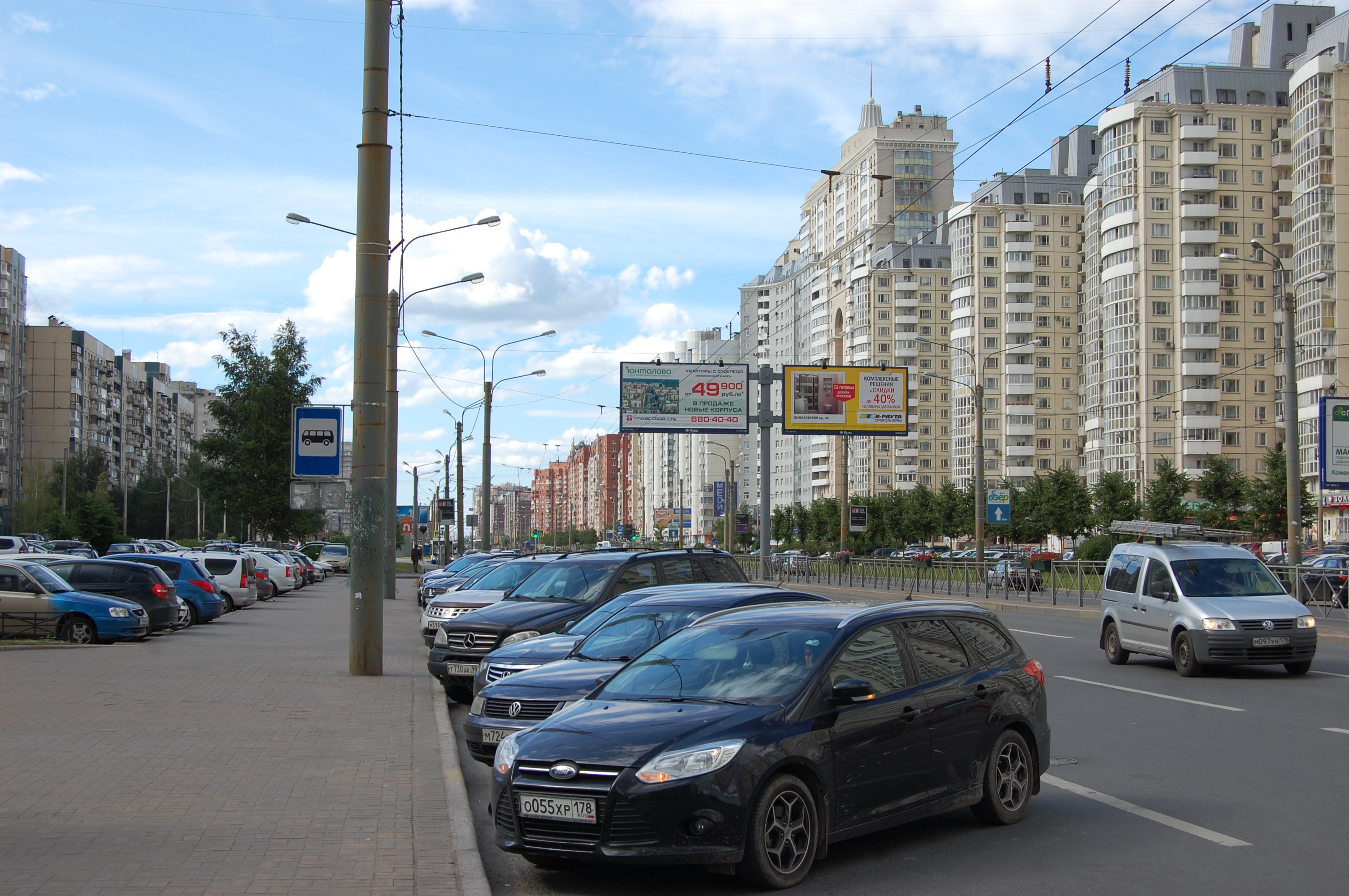 комендантский проспект в спб. вид от комендантской площади